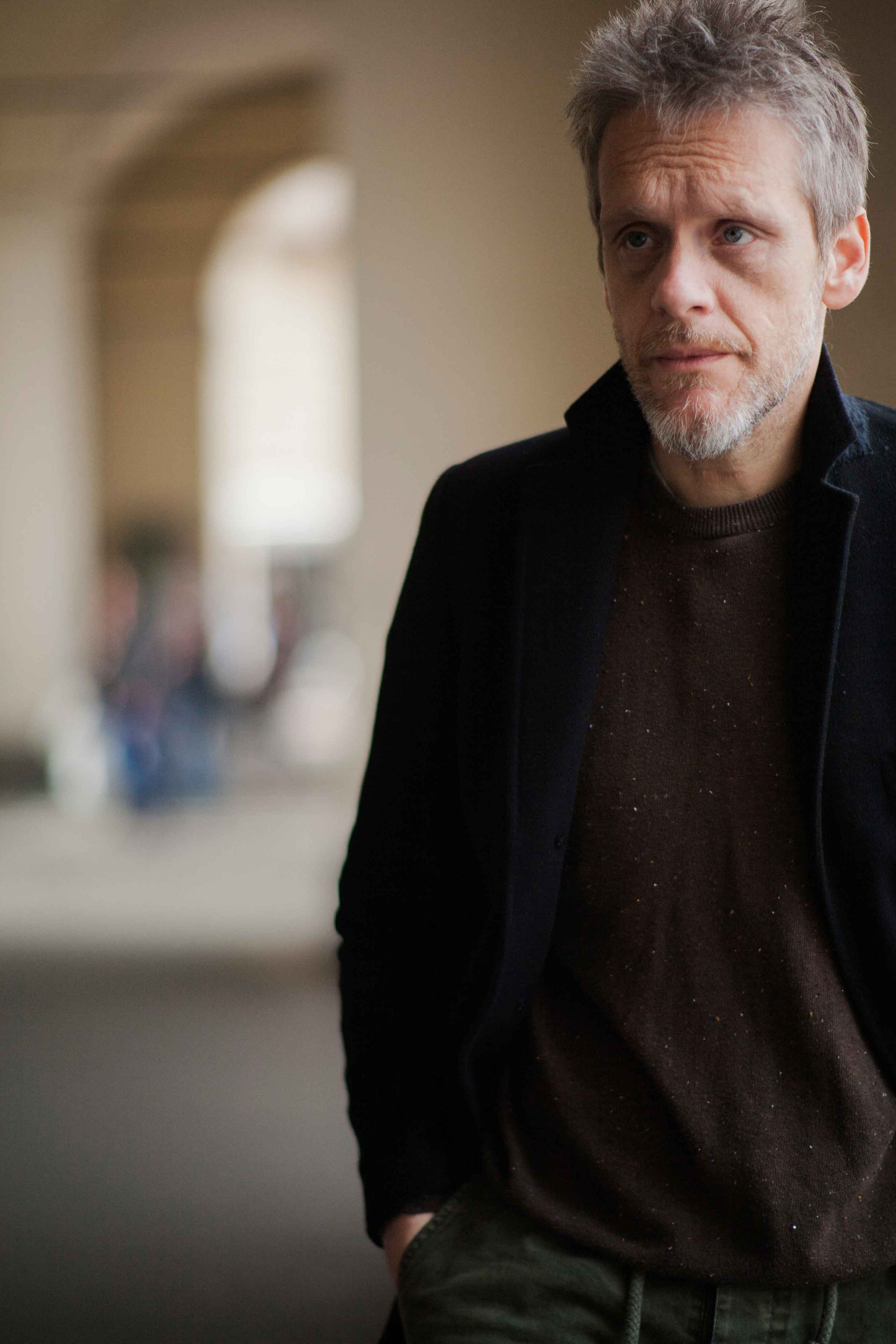 Attore e regista